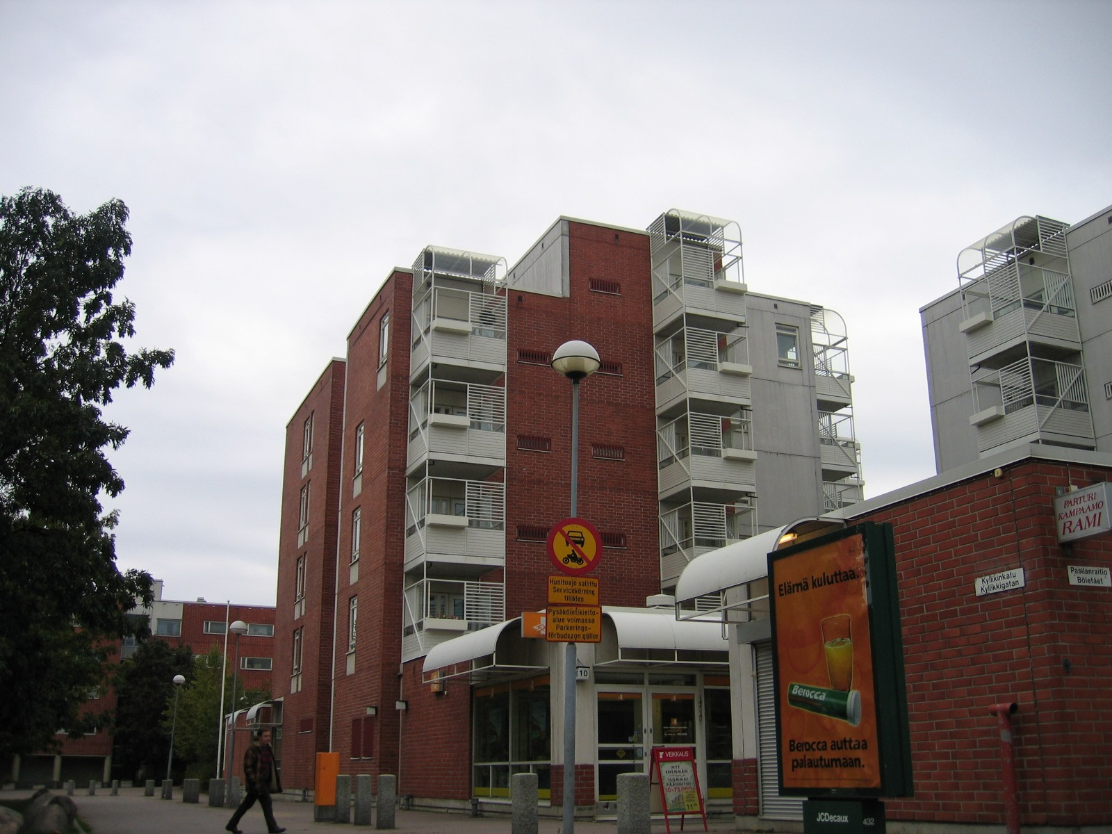 Länsi-Pasila/Västra Böle in Helsinki, Finland